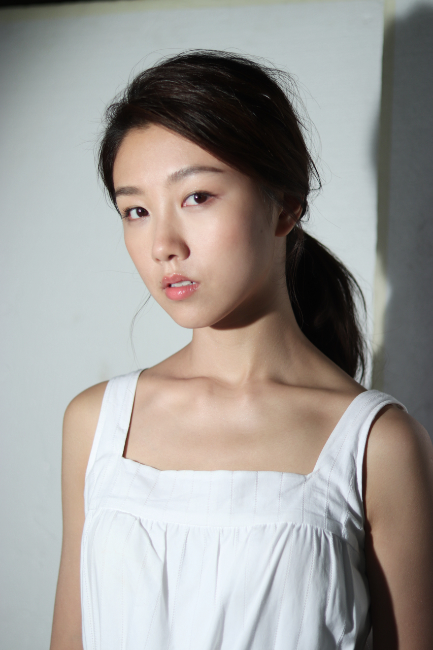 Cherry's 2018 PR photo